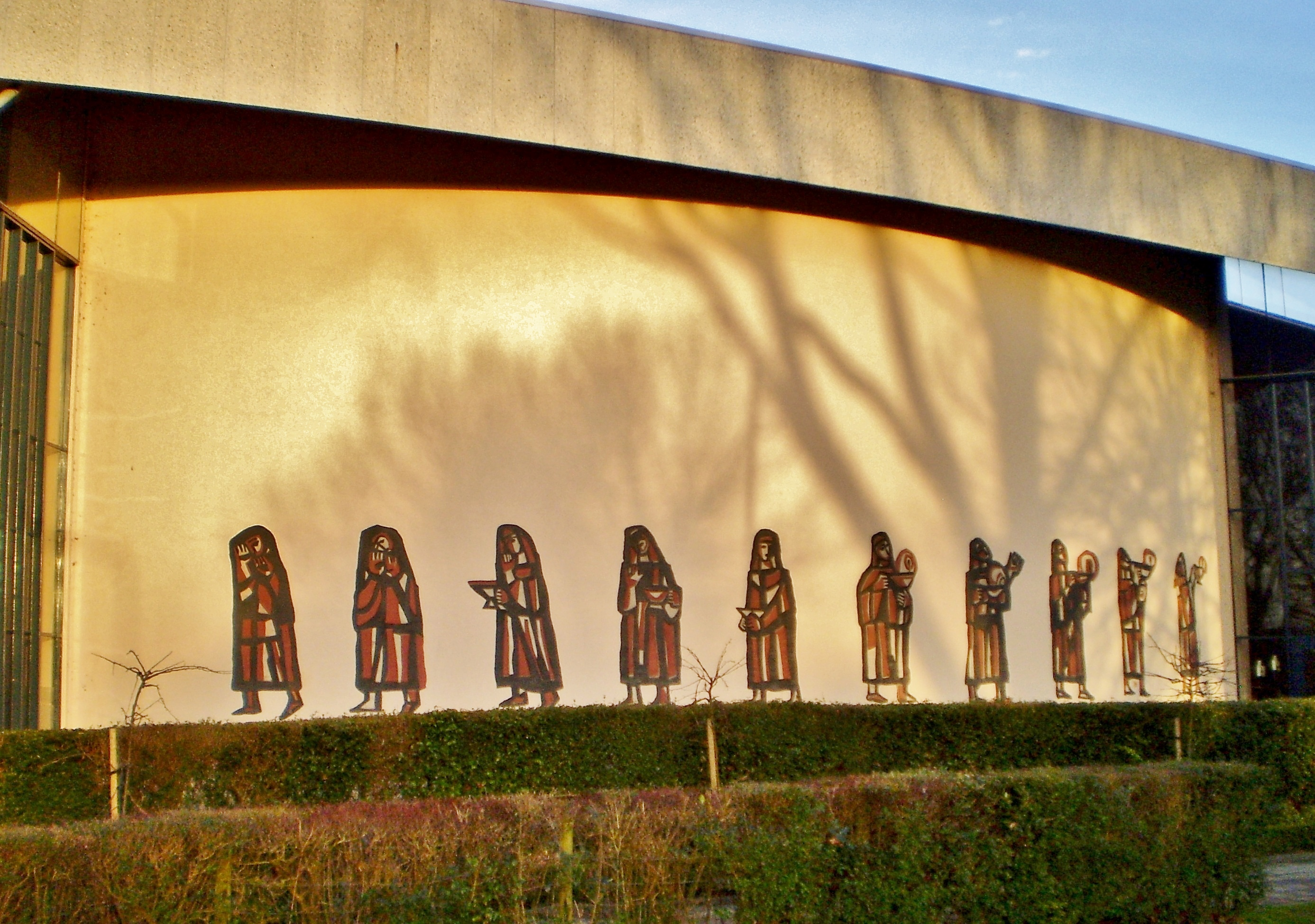 De vijf verstandige en de vijf domme bruiden met de olie lampen op de halfronde muur van de Maria Koninginkerk in Baarn. Gemaakt door Elly Meijer.